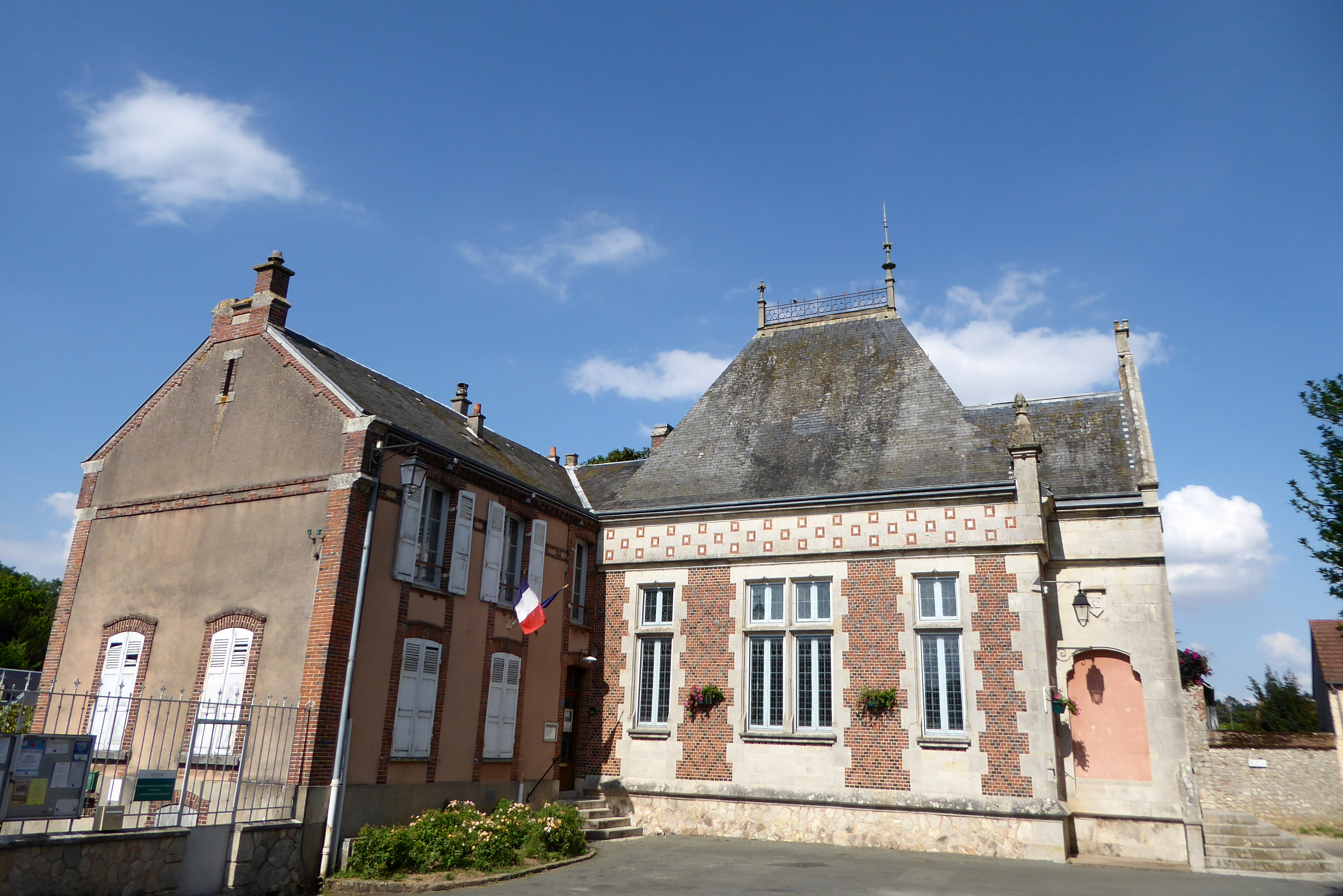 Mairie de Béville-le-Comte, Eure-et-Loir (France).